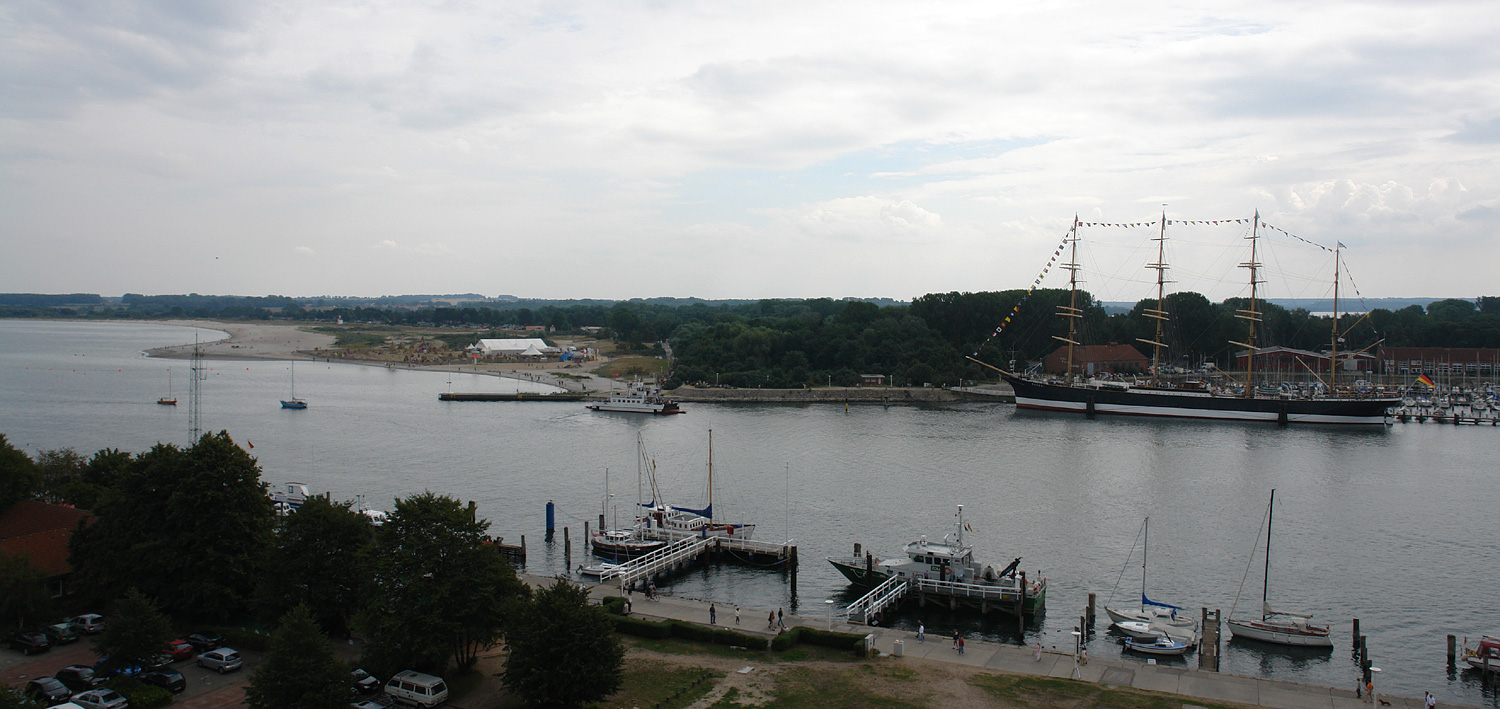 Priwall: Blick vom Leuchtturm auf Strand, Norderfähre und Passat